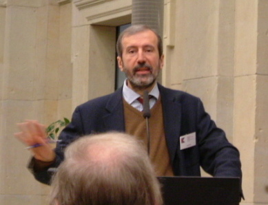 Luigi Rizzi, Berlin 2005